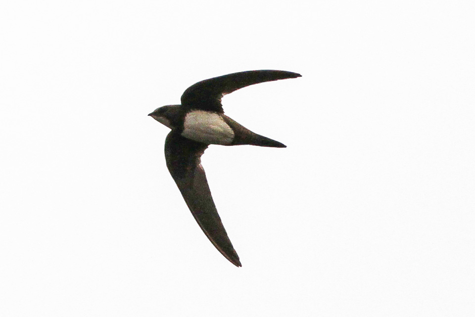 Alpine Swift Tachymarptis melba between Samarkand and Bukhara, Uzbekistan